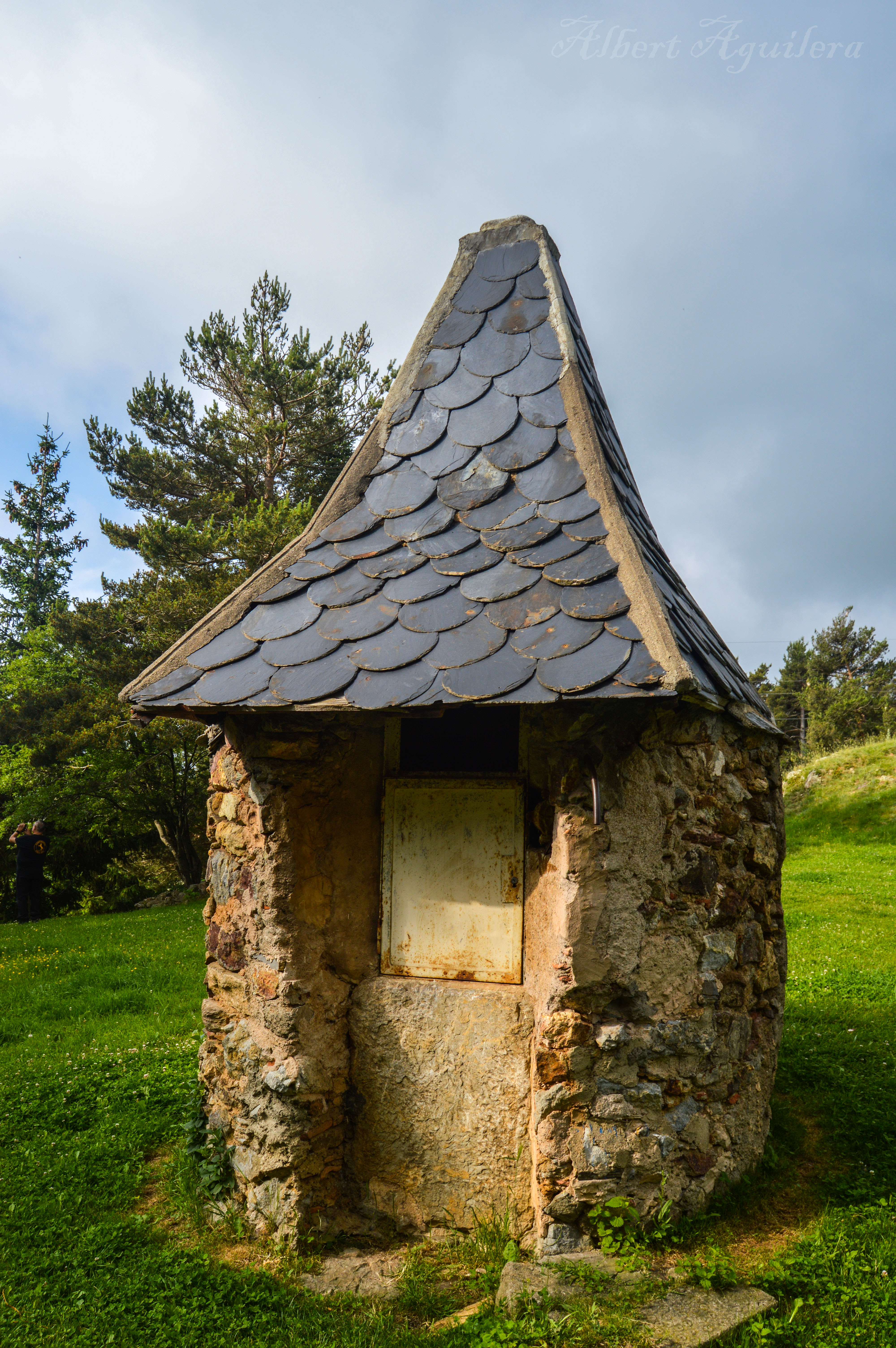 Pou situat a l'ermita de Sant Antoni a Campelles, Ripollès